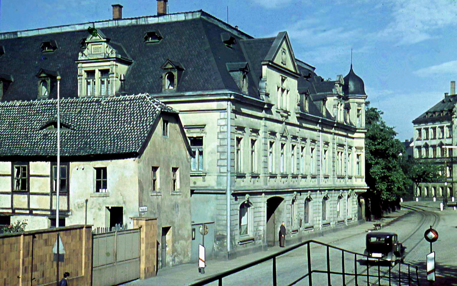 Wohn- und Geschaeftshaus der Georg Schleber AG in der Altstadt 5 in Reichenbach im Vogtland